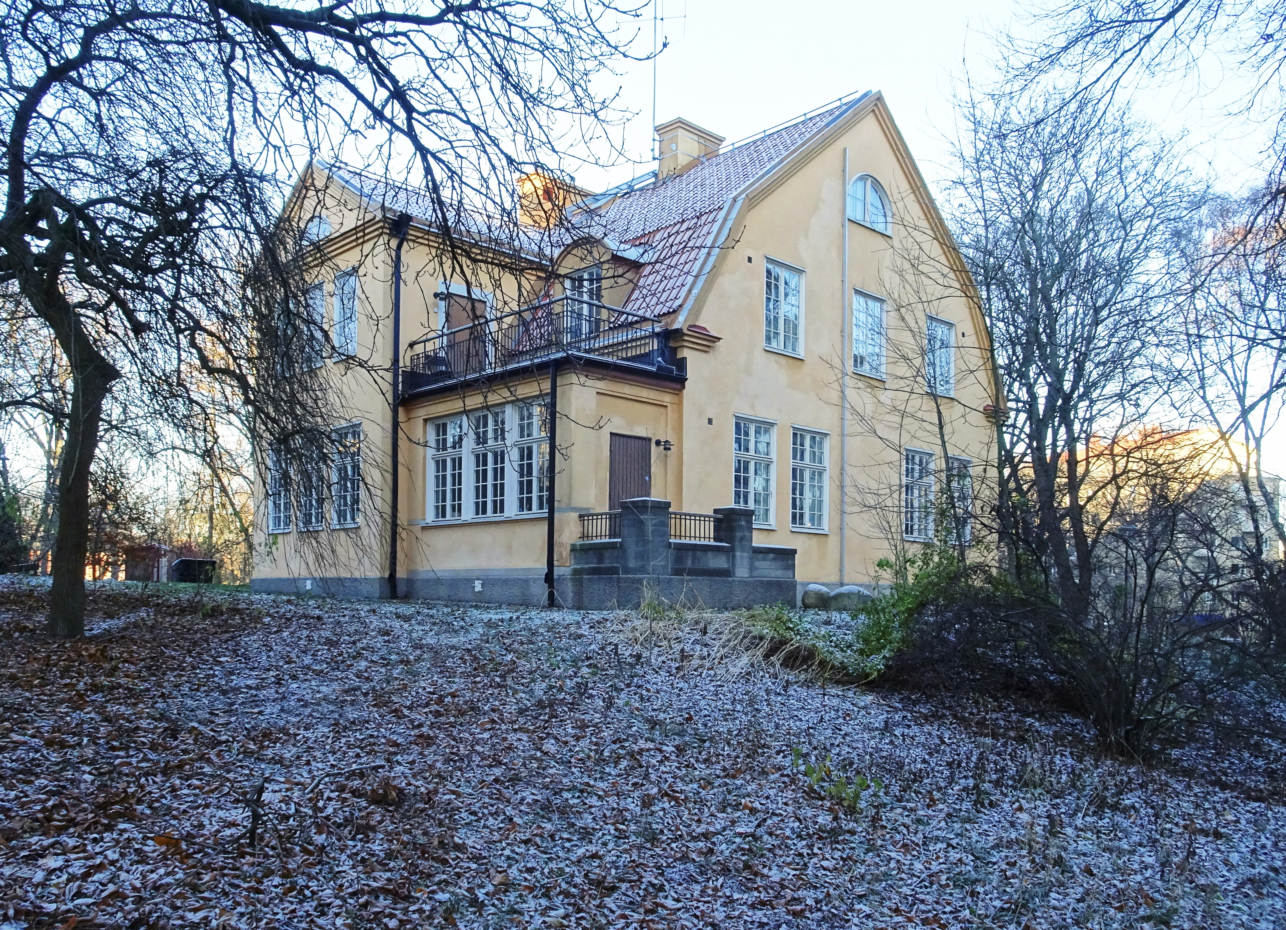 Reggio Emilia Institutet på Campus Konradsberg, ursprungligen Intendentvilla för Konradsberg, arkitekt Ture Stenberg (1914)